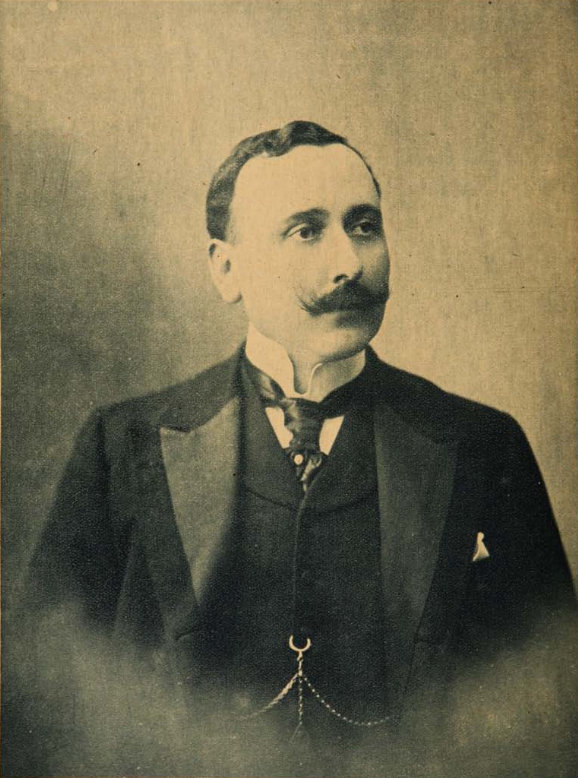 Comerciante y político chileno. Alcalde de Valparaíso en 1899 y 1901